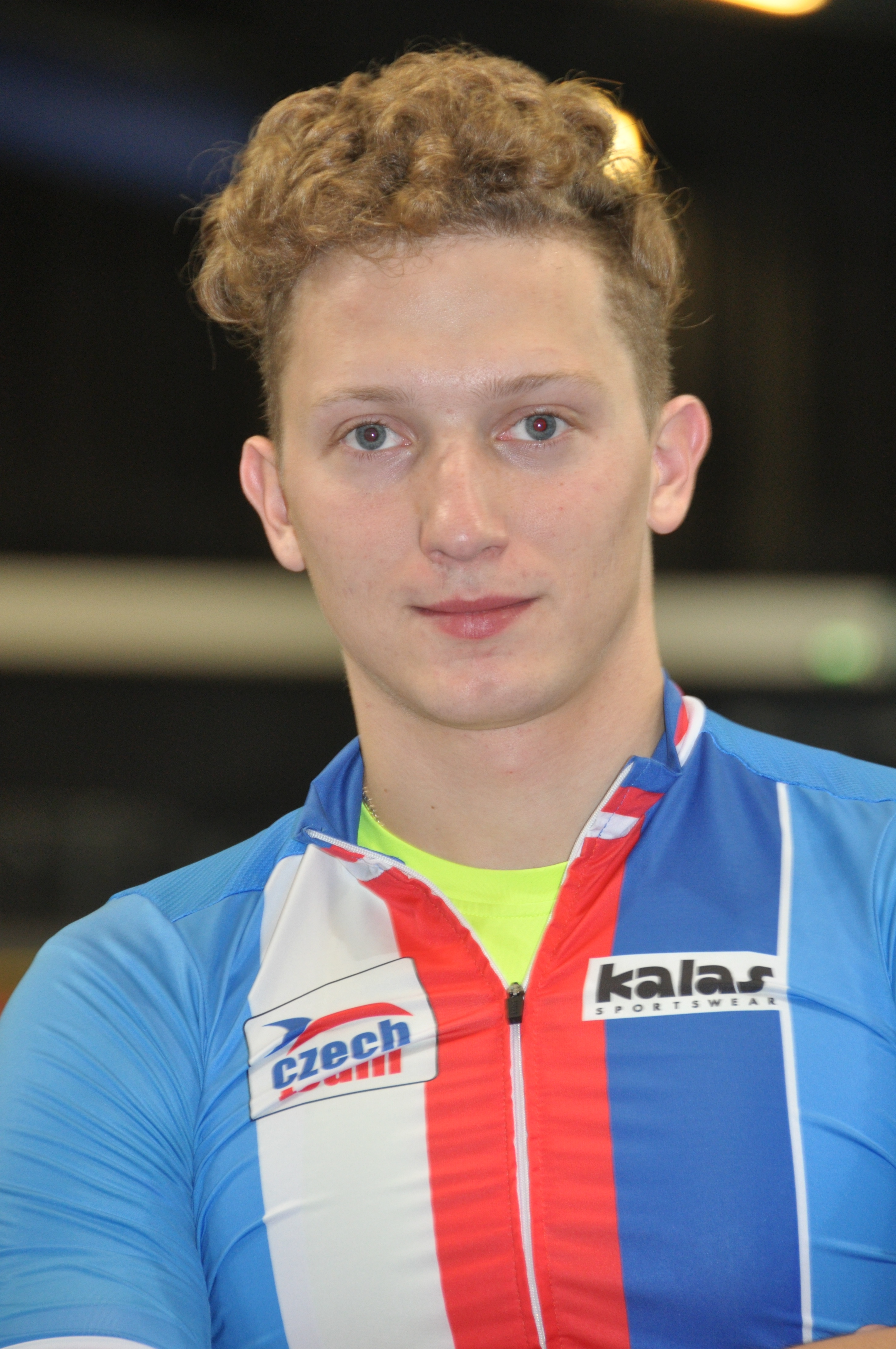 Robin Wagner, tschechischer Radsportler